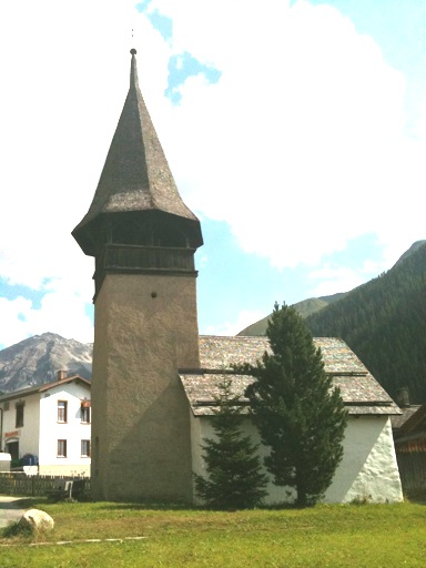 die alte reformierte Kirche Davos Monstein (Kanton Graubünden)